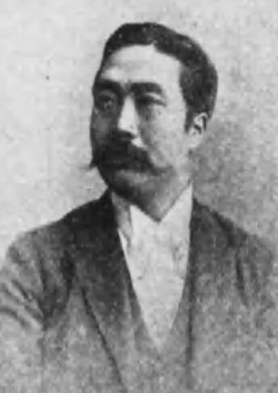 佐々木政吉